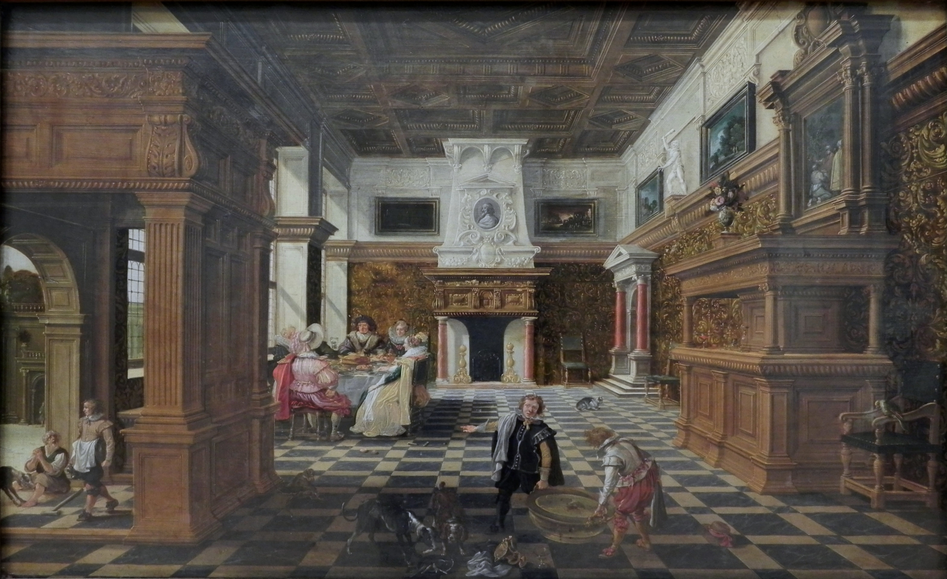 Saal mit dem Gleichnis vom armen Lazarus und dem reichen Mann (Lukas-Evangelium 16, 19-21). Innenraumansicht von Bartholomeus van Bassen. Esaias van de Velde fügte das Gleichnis vom armen Lazarus ein.